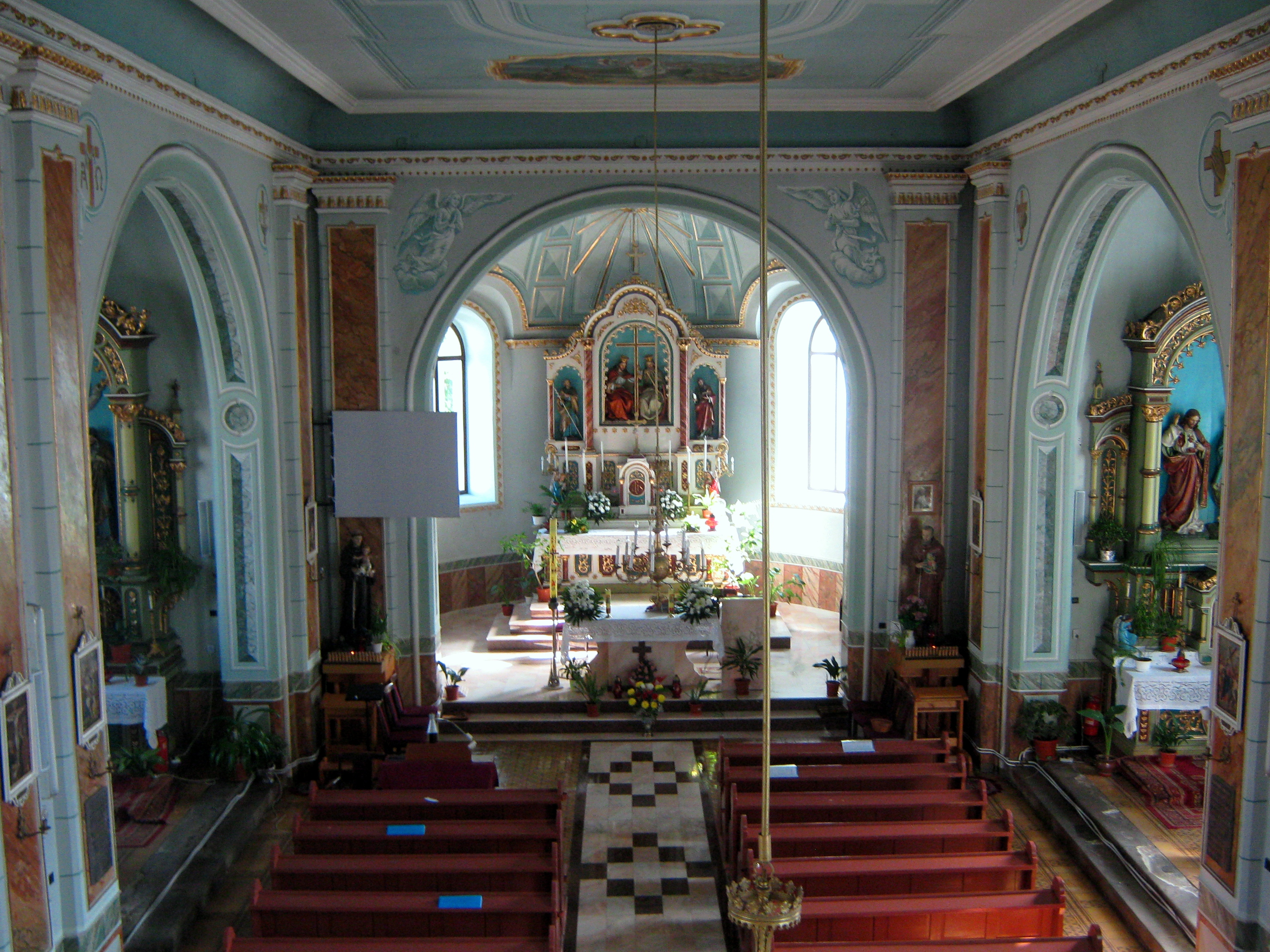 Interior - Biserica romano-catolica din Gura Humorului